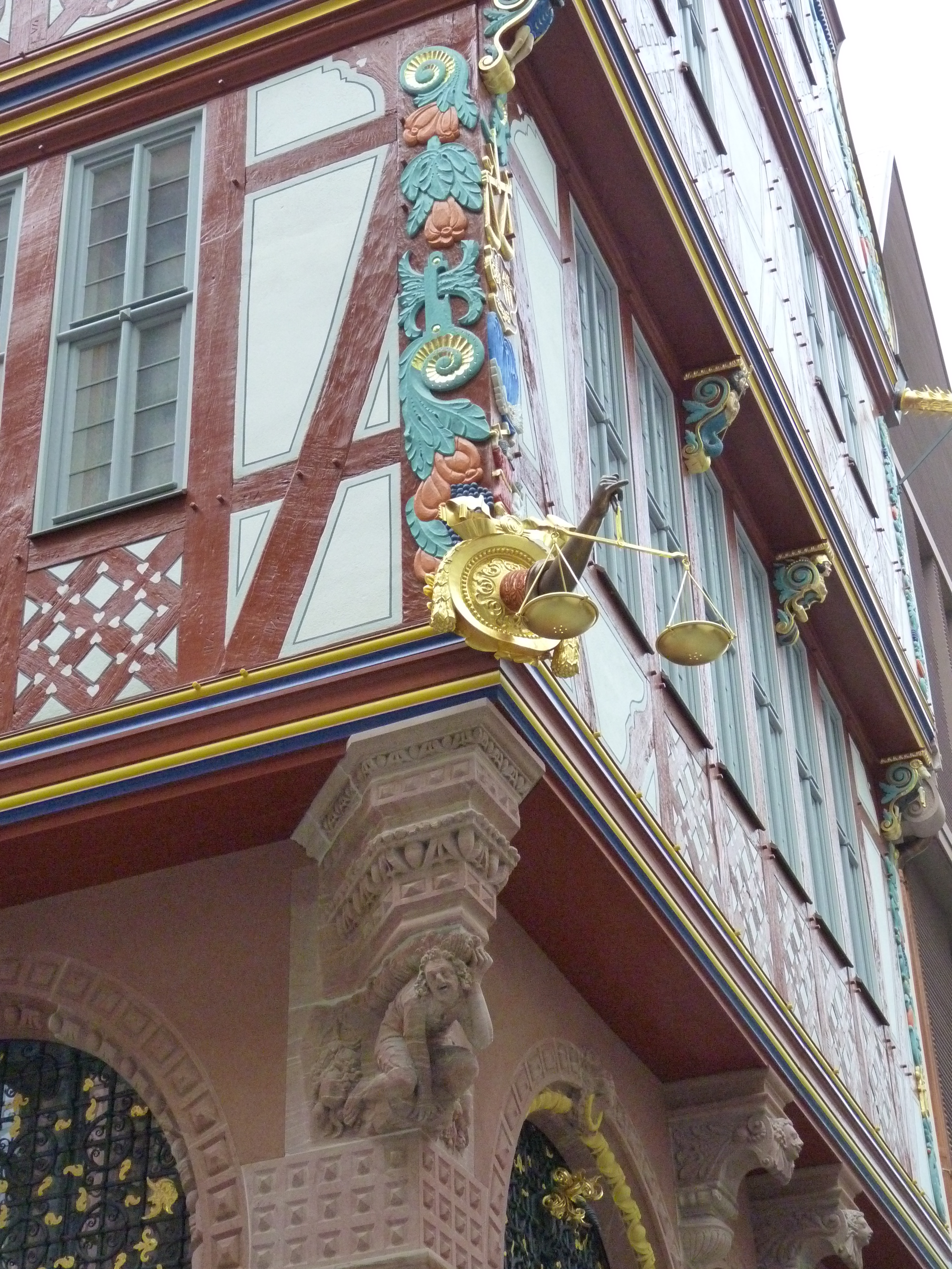 Rekonstruierte Waage am Haus zur Goldenen Waage, Frankfurt am Main